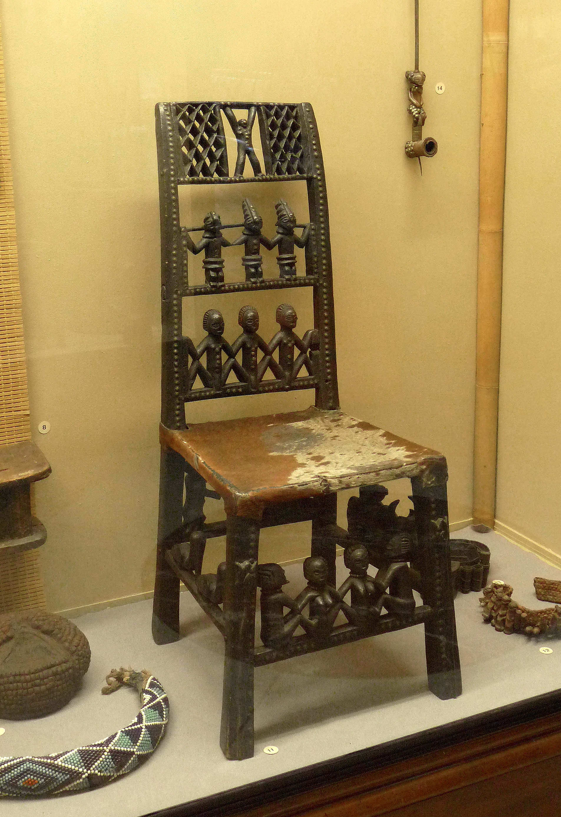 Siège Tshokwe. Kasaï-Sud, Zaïre/Angola. Bois : Vitex doniana. Musée royal de l'Afrique centrale